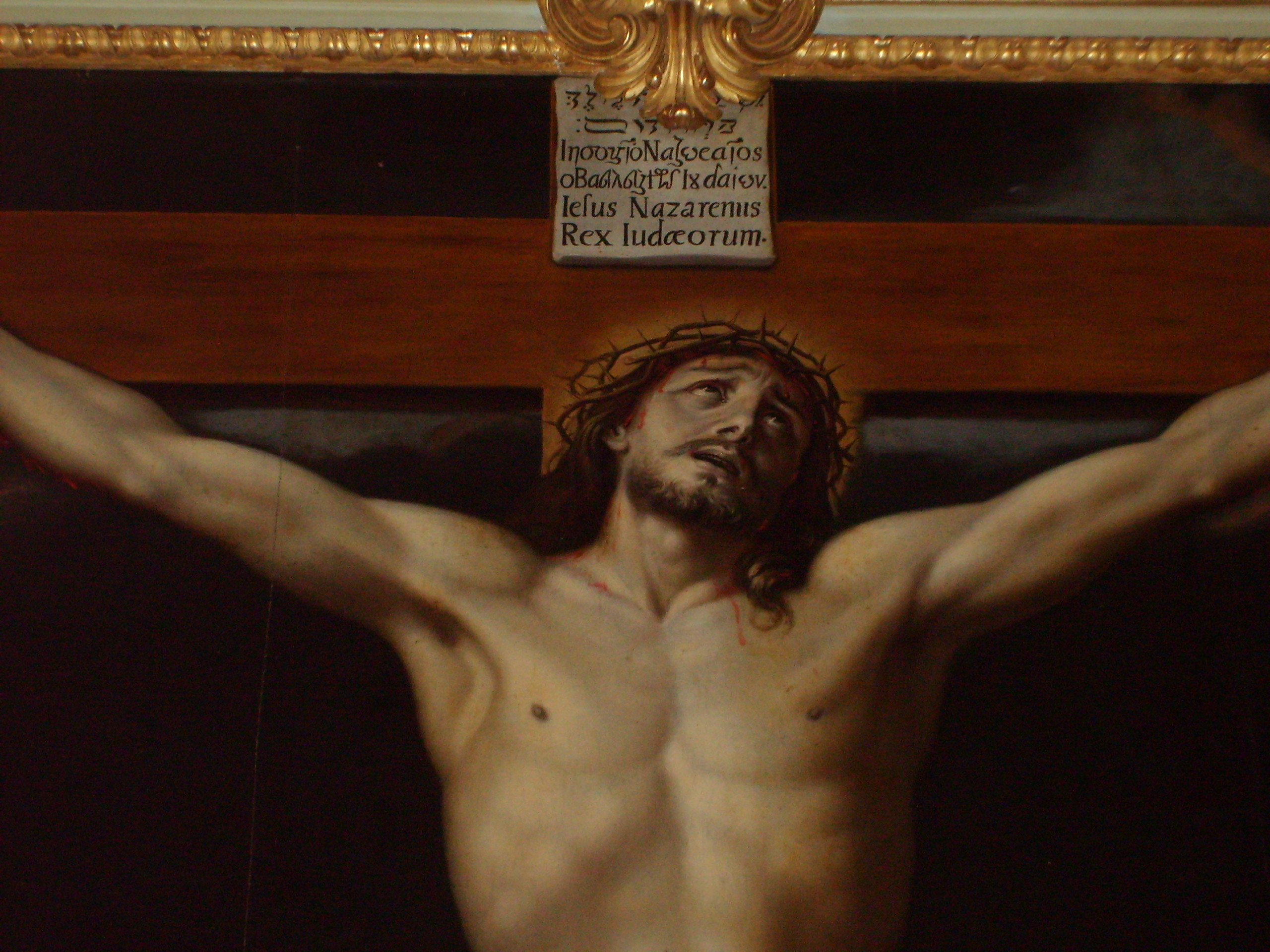 La crucifixion (detail)